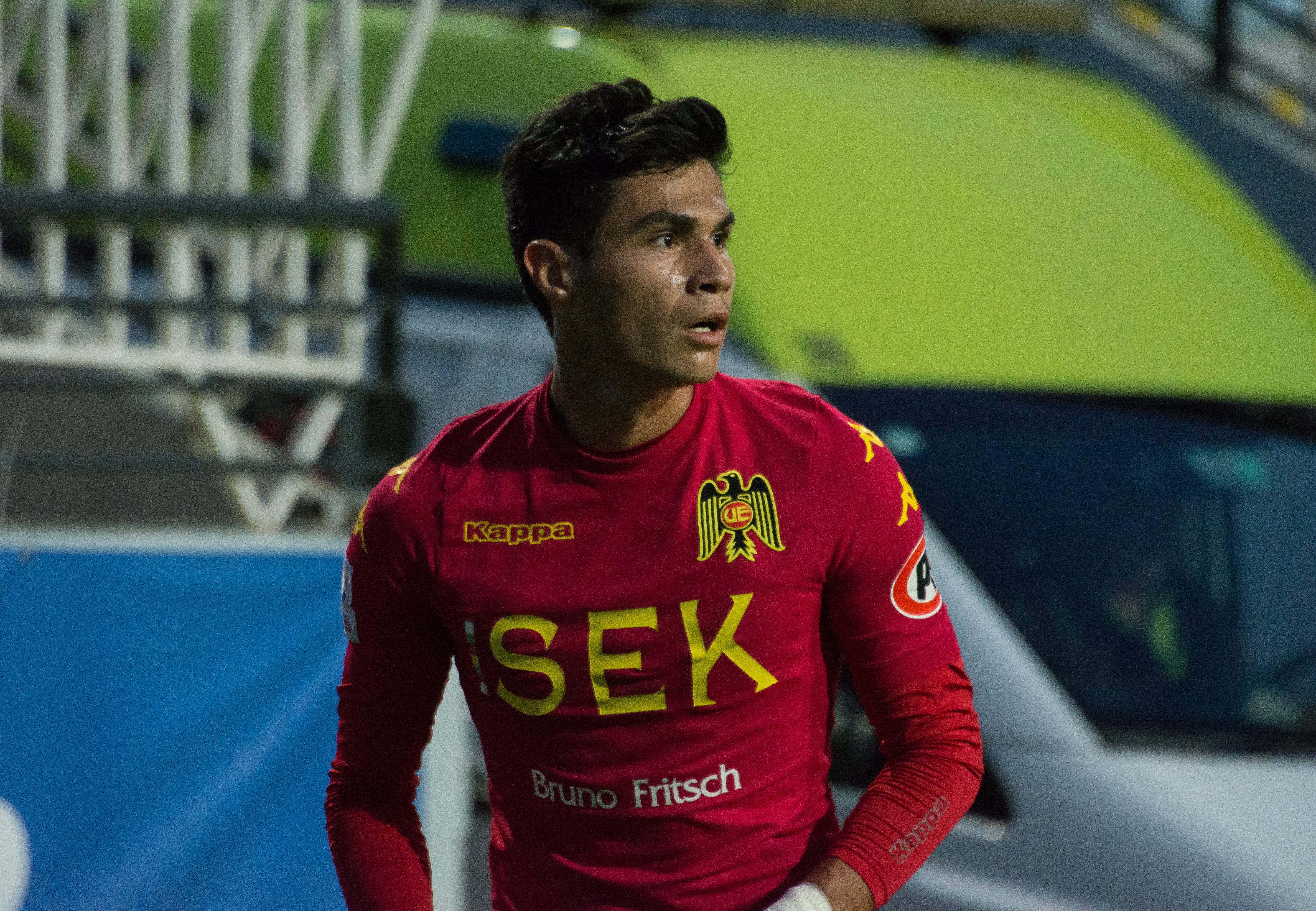 Everton v Unión Española, Estadio Sausalito, Viña del Mar, Chile.